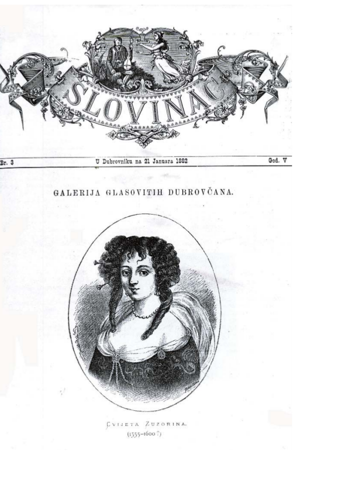 Часопис Словинац